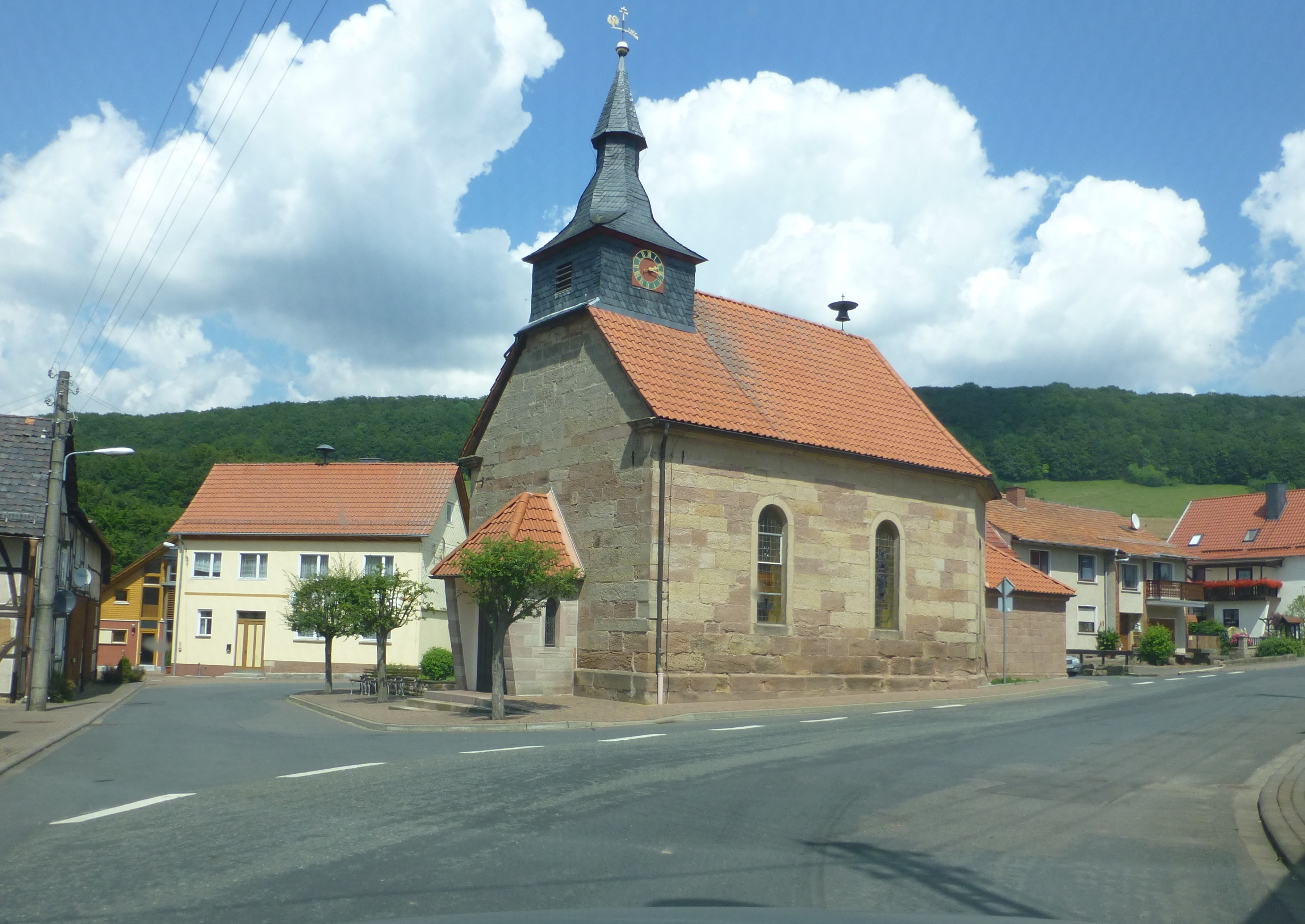 Kirche in Eichstruth